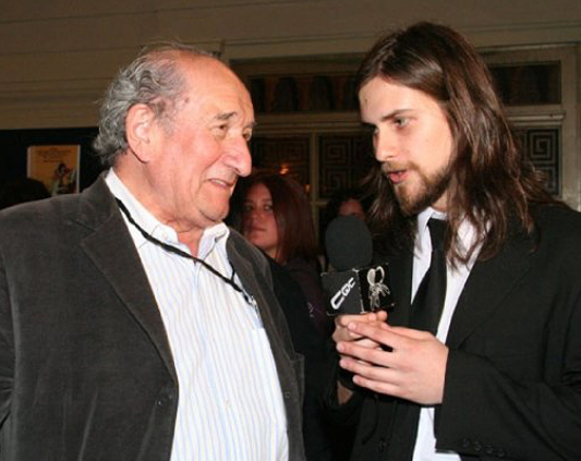 Luis Alarcón entrevistado por Jean Philippe Cretton para CQC (2009).